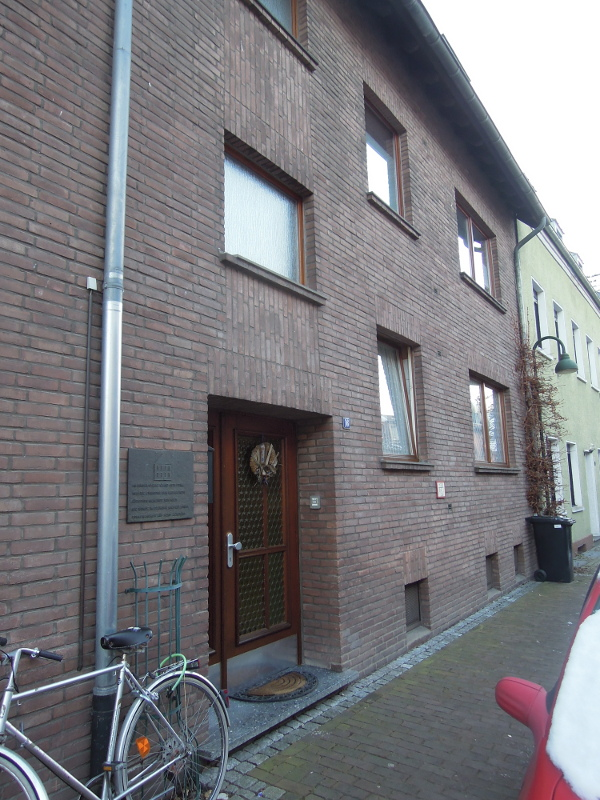 Stolpersteinlage Rees Oberstadt 16